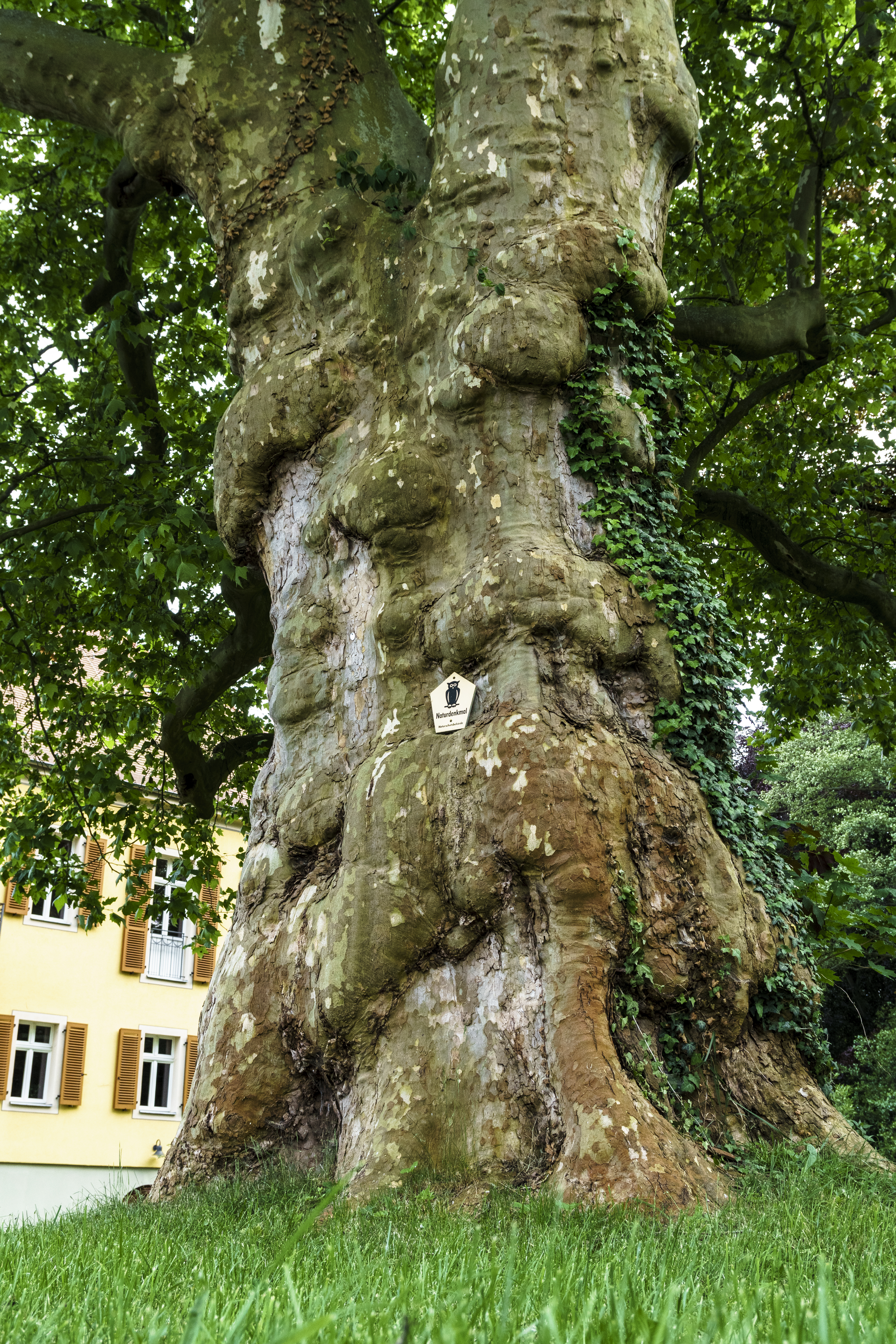 Naturdenkmal im Kreis Kamenz: Platane neben dem Rathaus, Rathausallee 2 in 02994 Bernsdorf